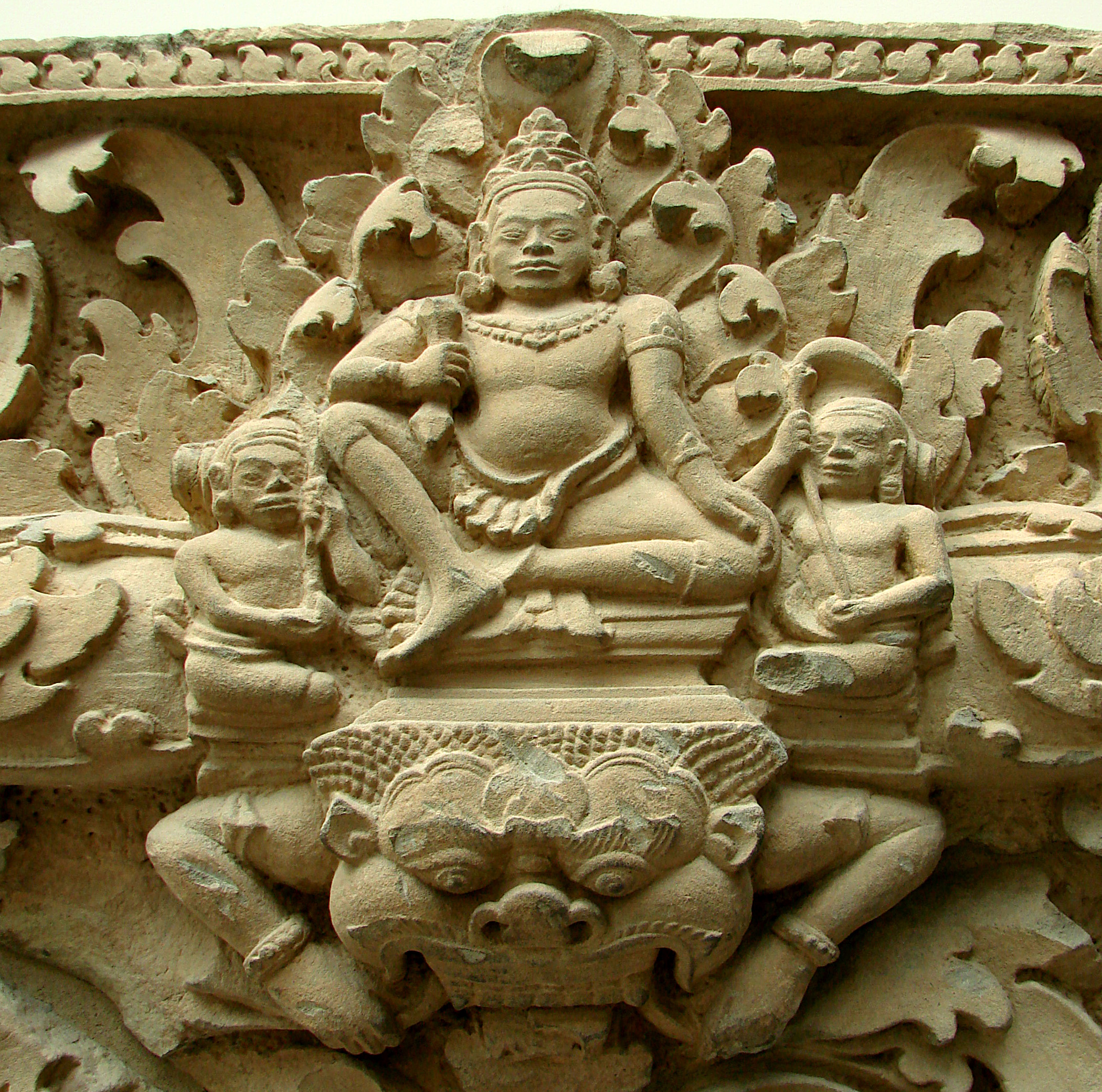 Linteau. Provenance: Cambodge, province de Siemreap, Prasat Koki (Phnom Kulen). Style de Kulen, 9ème siècle, grès. Au centre: Indra, dieu de l'orage et gardien de l'Est, entouré de serviteurs. Musée Guimet,Paris.